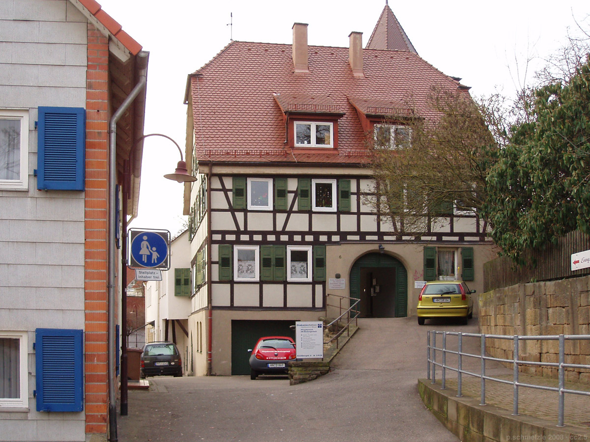 Mesnerhaus in der Kirchbergstraße 6 bei der evangelischen Kirche in Heilbronn-Neckargartach